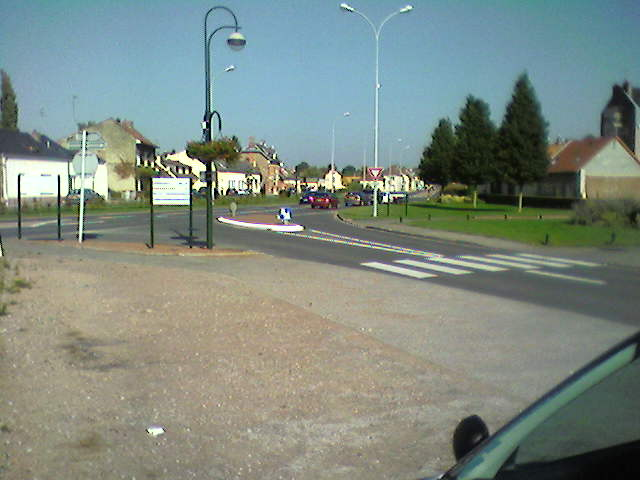 Image du centre ville de Salouël